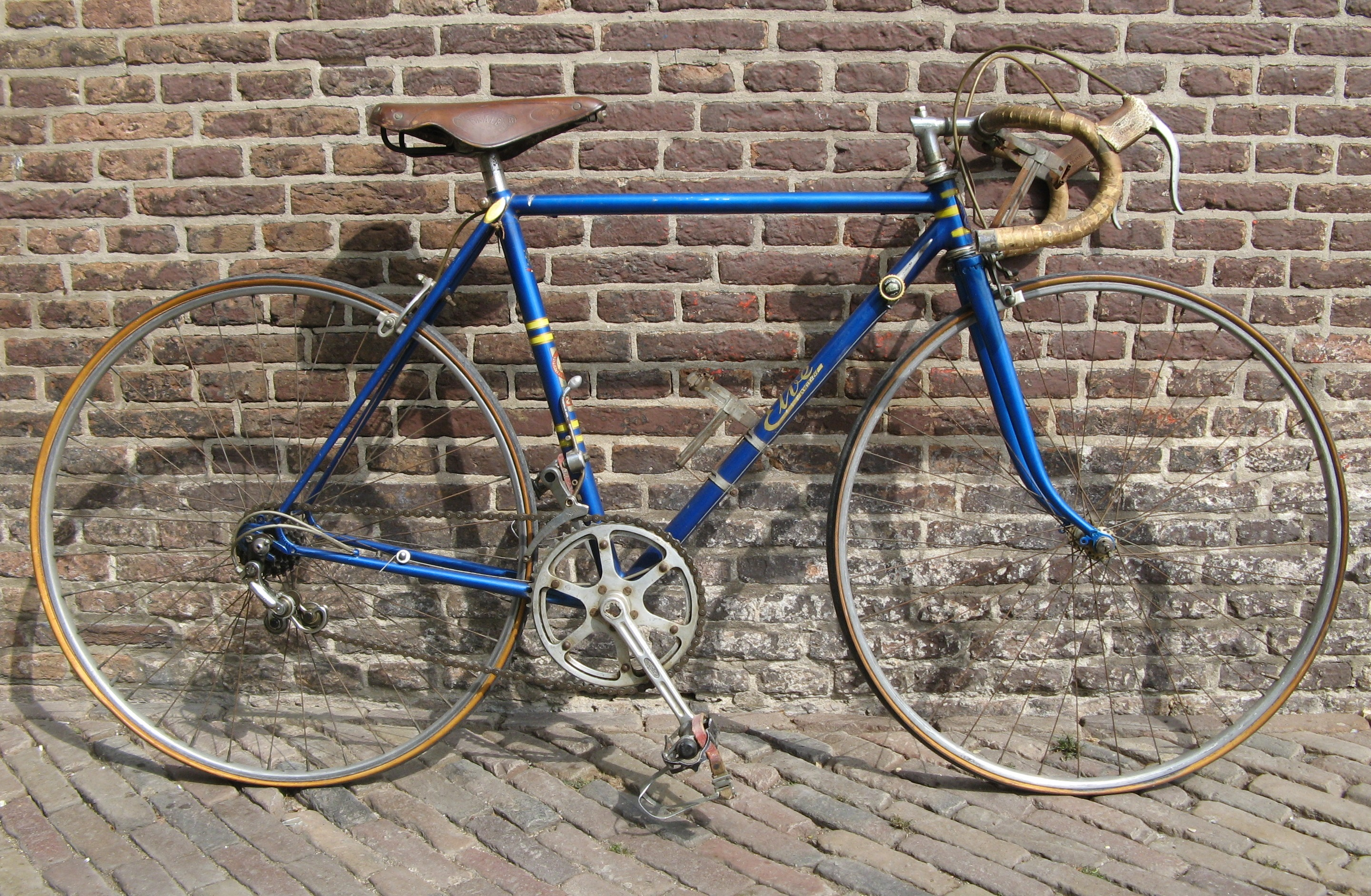 Wereldkampioenfiets Stan Ockers 1955